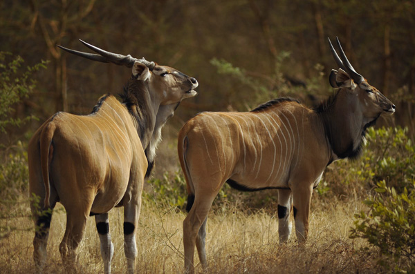 Antilopa Derbyho (Taurotragus derbianus derbianus)